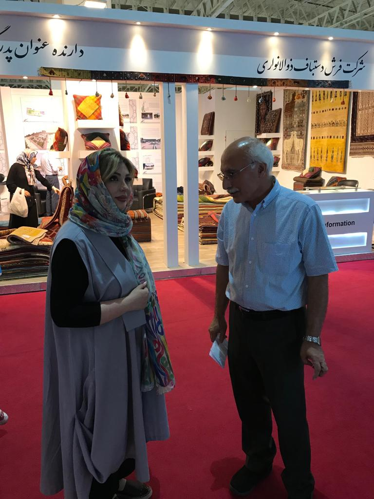 حضور محترم خانم نیوشا ضیغمی و استاد بهرام الیاسی در کنار اثر مشاهیر در نمایشگاه بین المللی